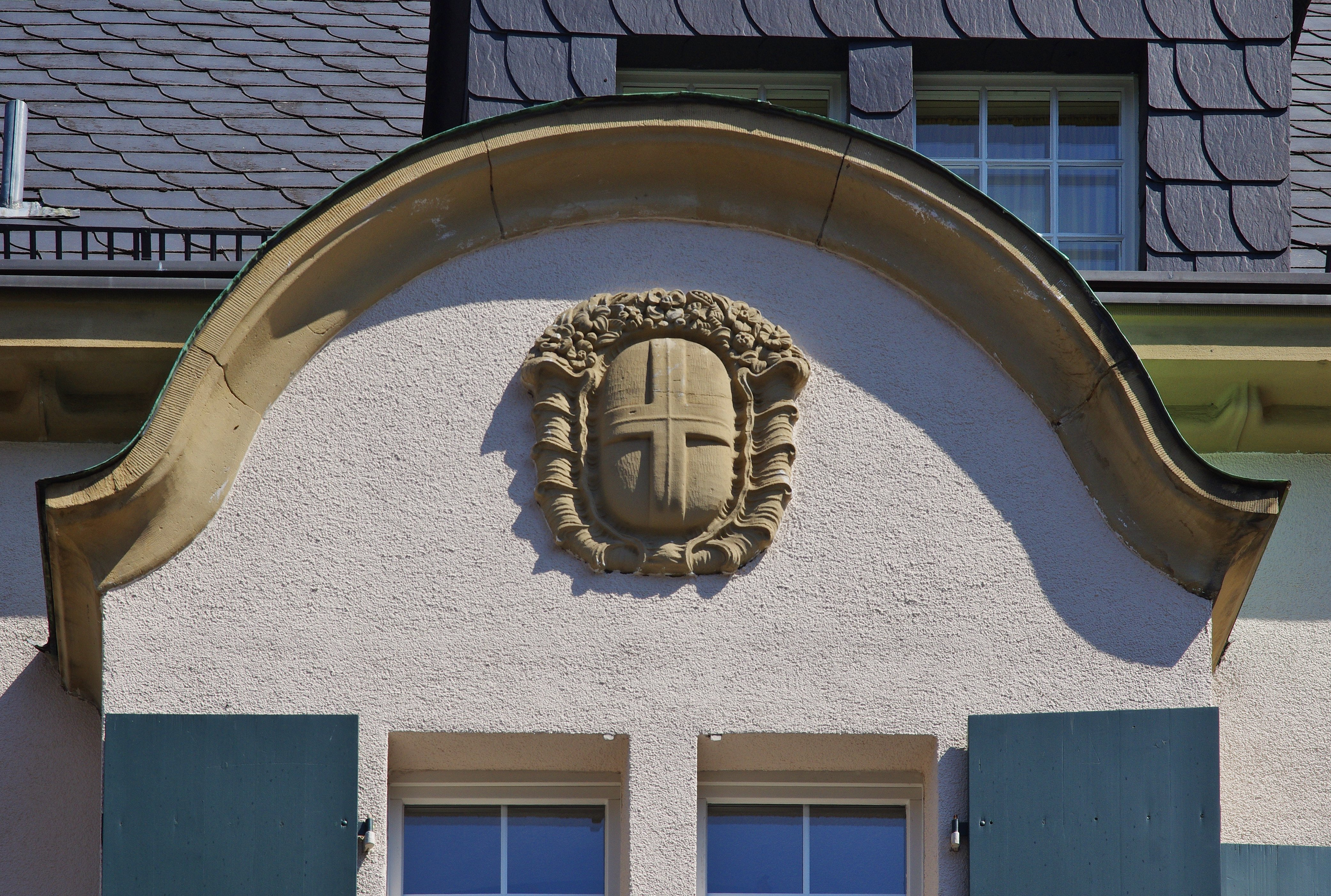 Freiburg im Breisgau: Die ehemalige Oberpostdirektion in der Lessingstr. 14, jetzt Verbindungshaus des Corps Suevia Freiburg im KSCV